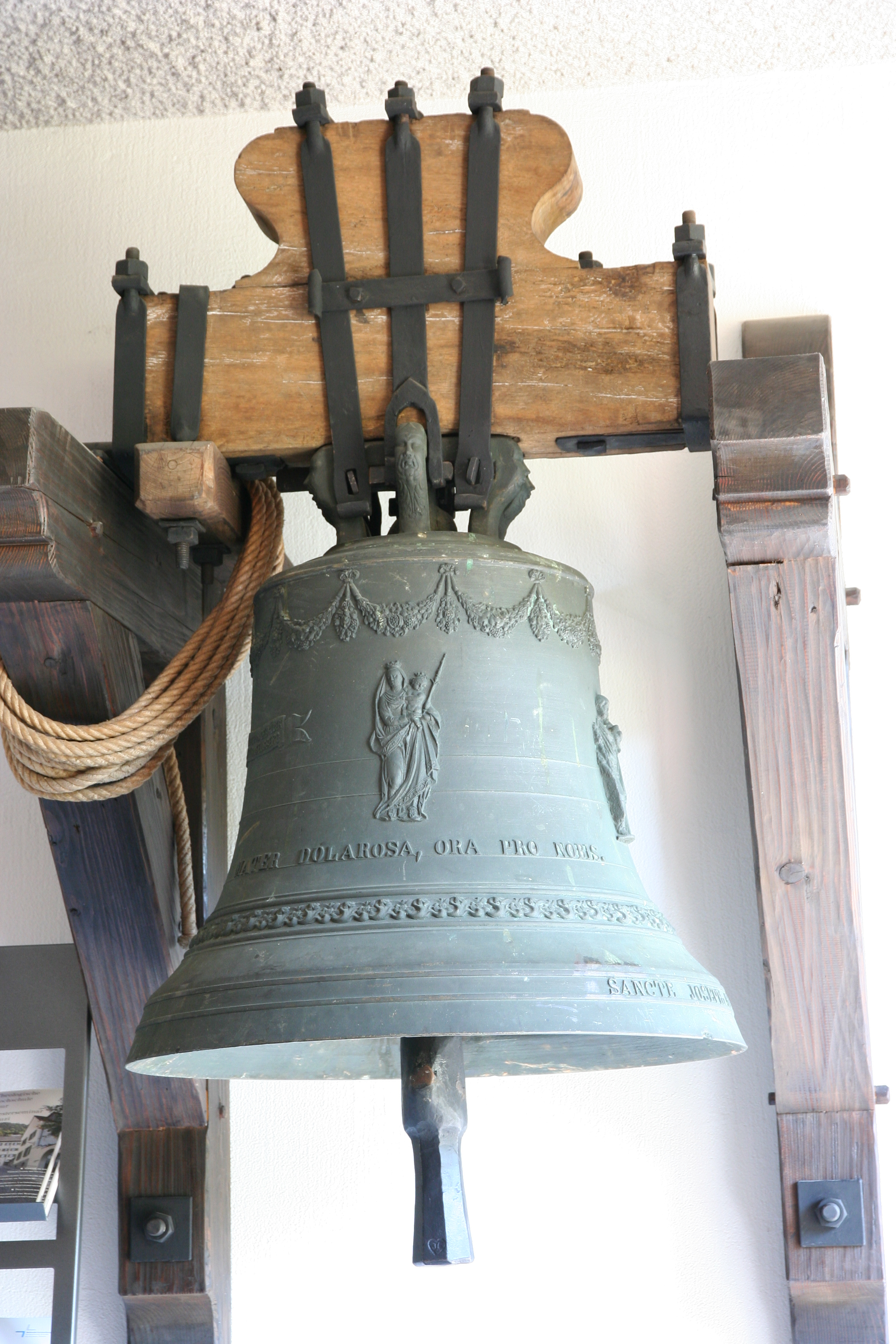 Römisch-katholische Pfarrkirche St. Martin Birmensdorf ZH